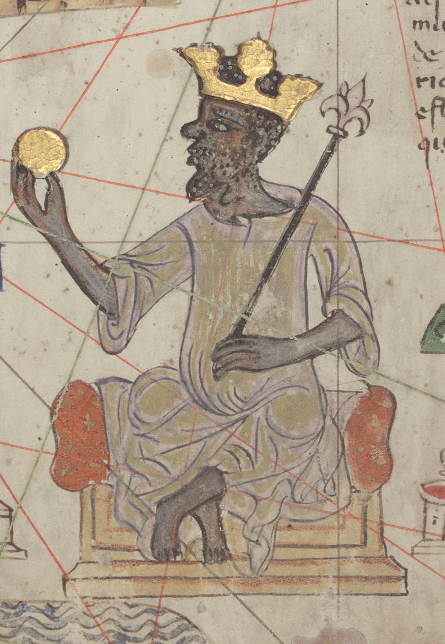 Détail de l'Atlas Catalan représentant Kanga Mussa.